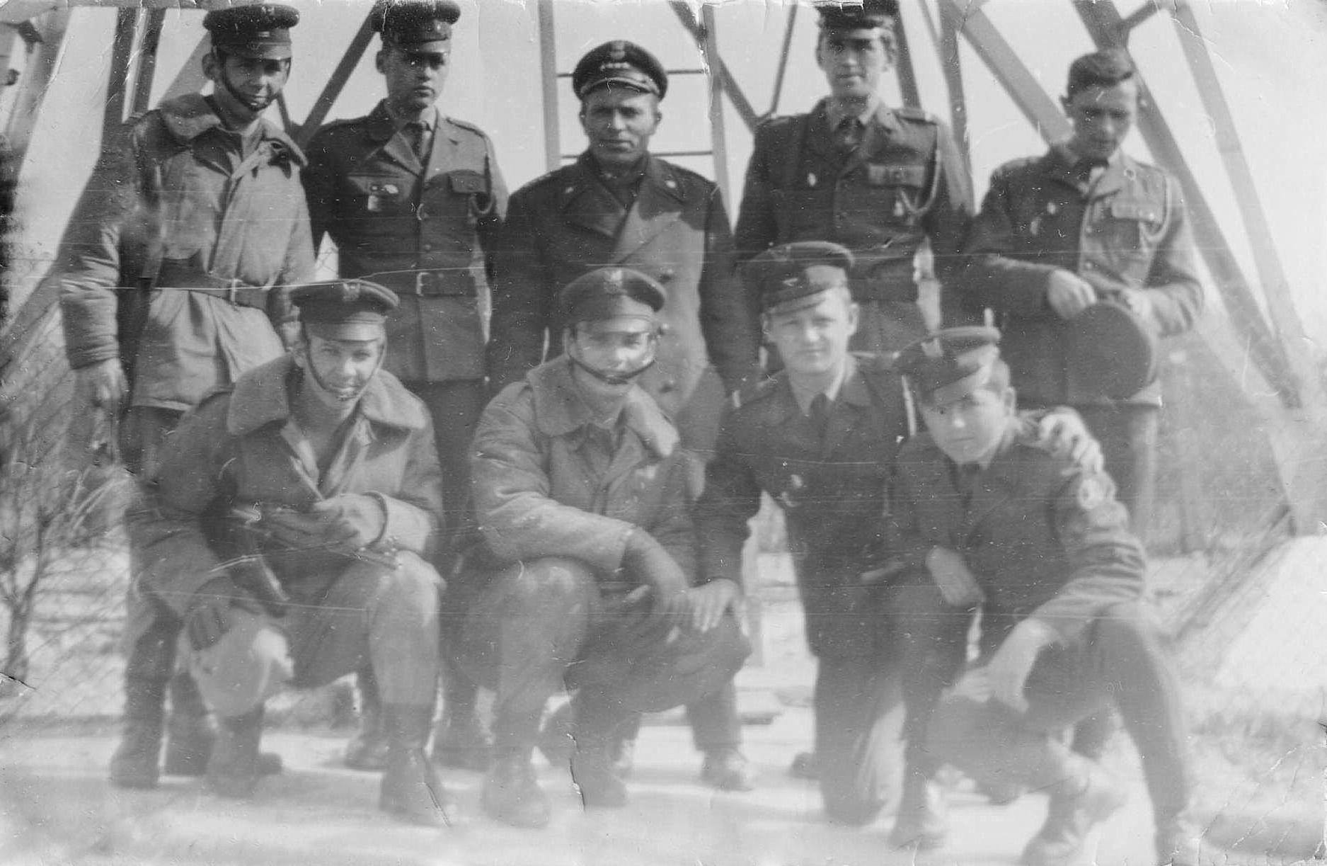 Żołnierze WOP i d-ca strażnicy kpt. Jan Dąbrowski przy POWT 7 (Międzywodzie) – Strażnica Wojsk Ochrony Pogranicza Dziwnów